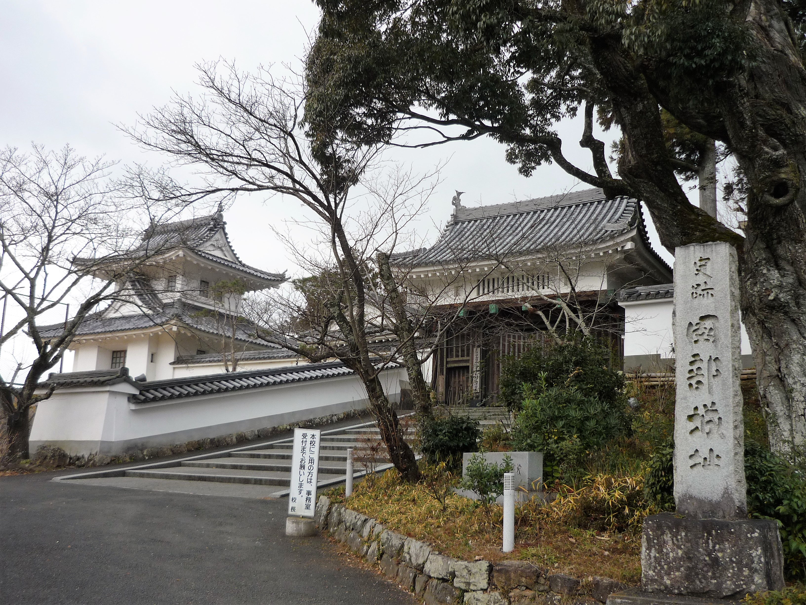 園部城址・京都府立園部高等学校 Panasonic Lumix DMC-FS3